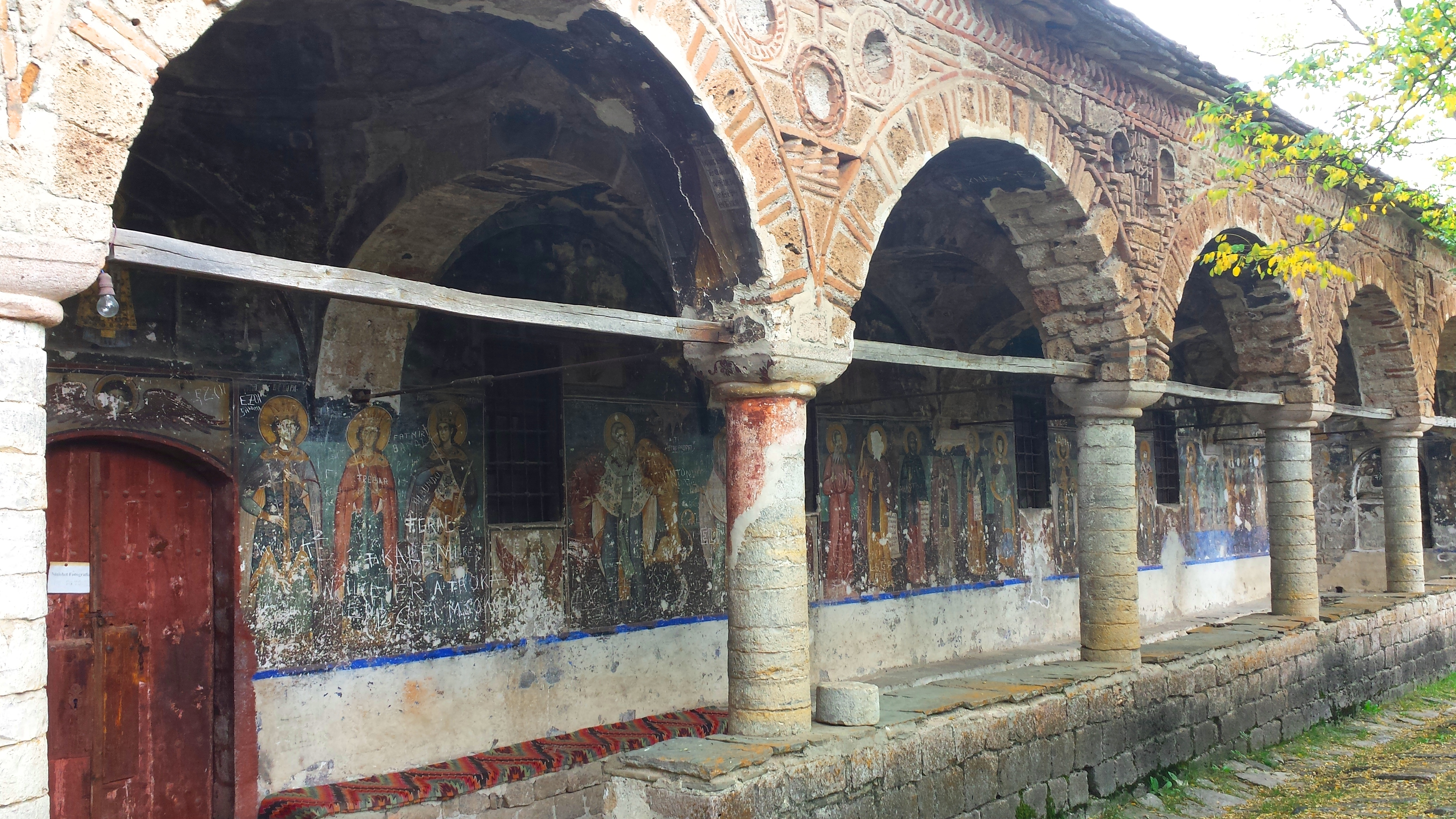 Kisha e Shen Kollit